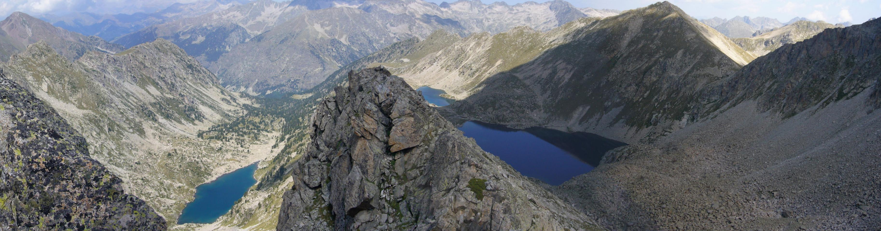 Vall de Morrano vista des del l'extrem sud-est del seu eix central; la Vall de Boí, Alta Ribagorça, Catalunya